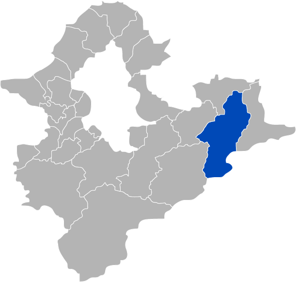 KaurJmeb為編輯臺灣省臺北縣雙溪鄉，於2005年2月7日所繪。